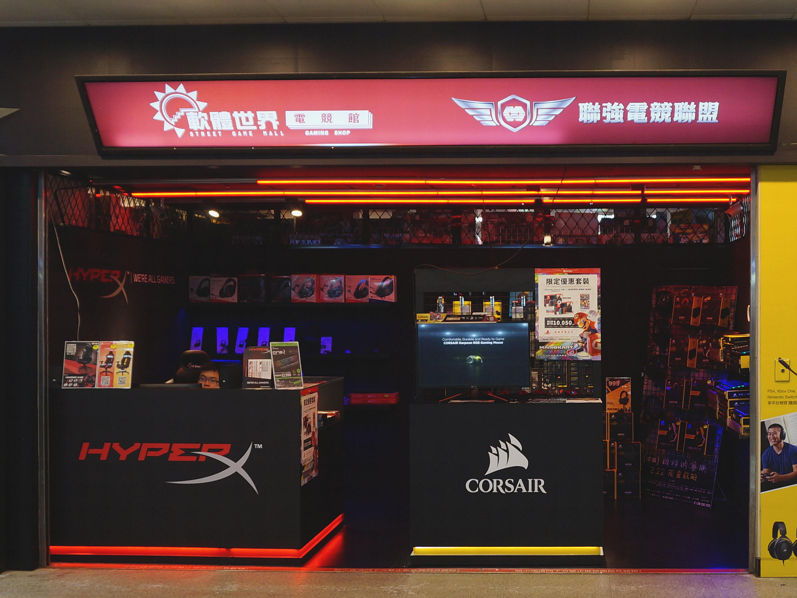 軟體世界電競館，位於台北地下街Y15、Y16出口附近。